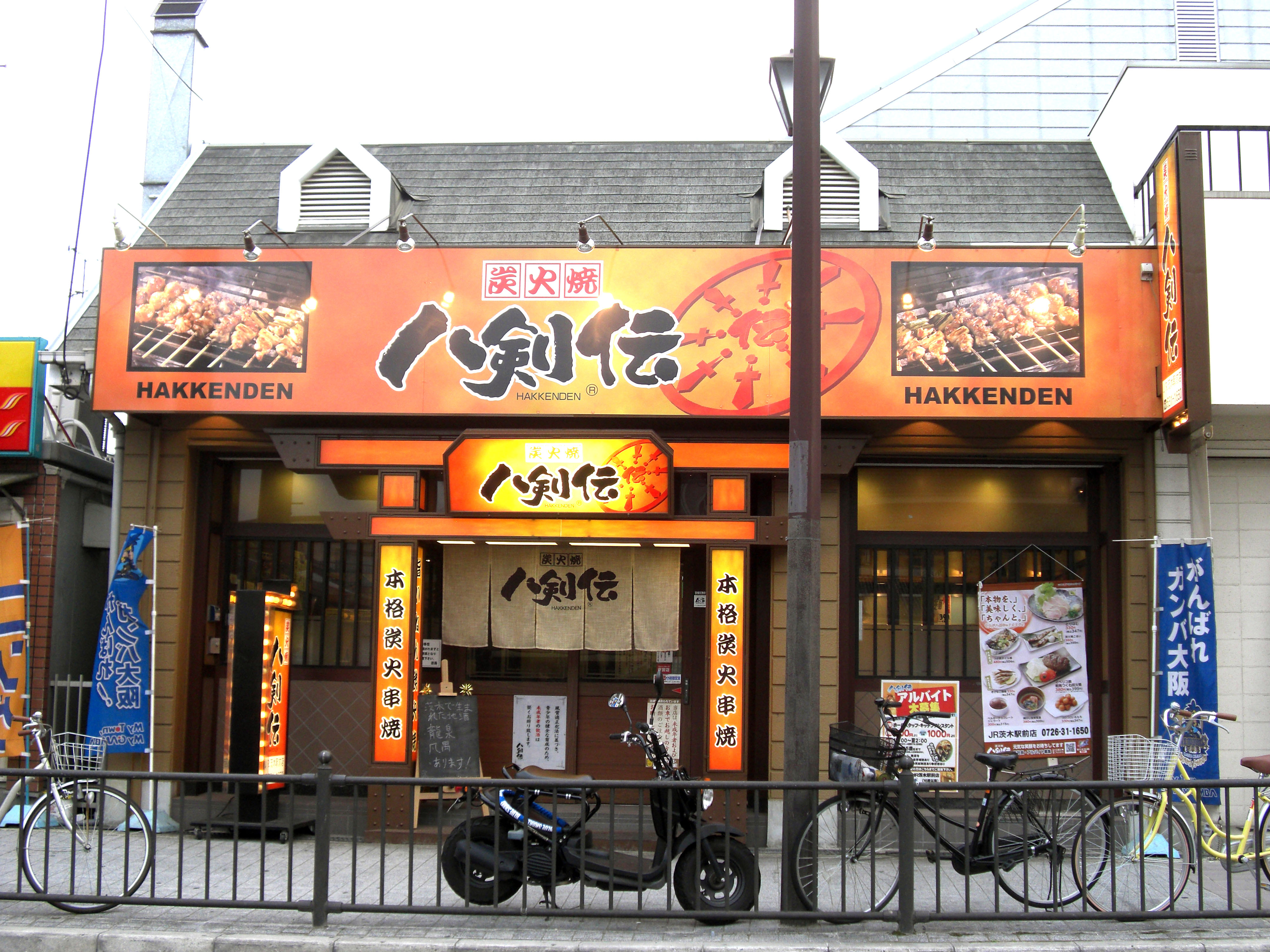 Hakkenden Ibaraki-Ekimae,Nishichujo Ibaraki-City Osaka Japan.